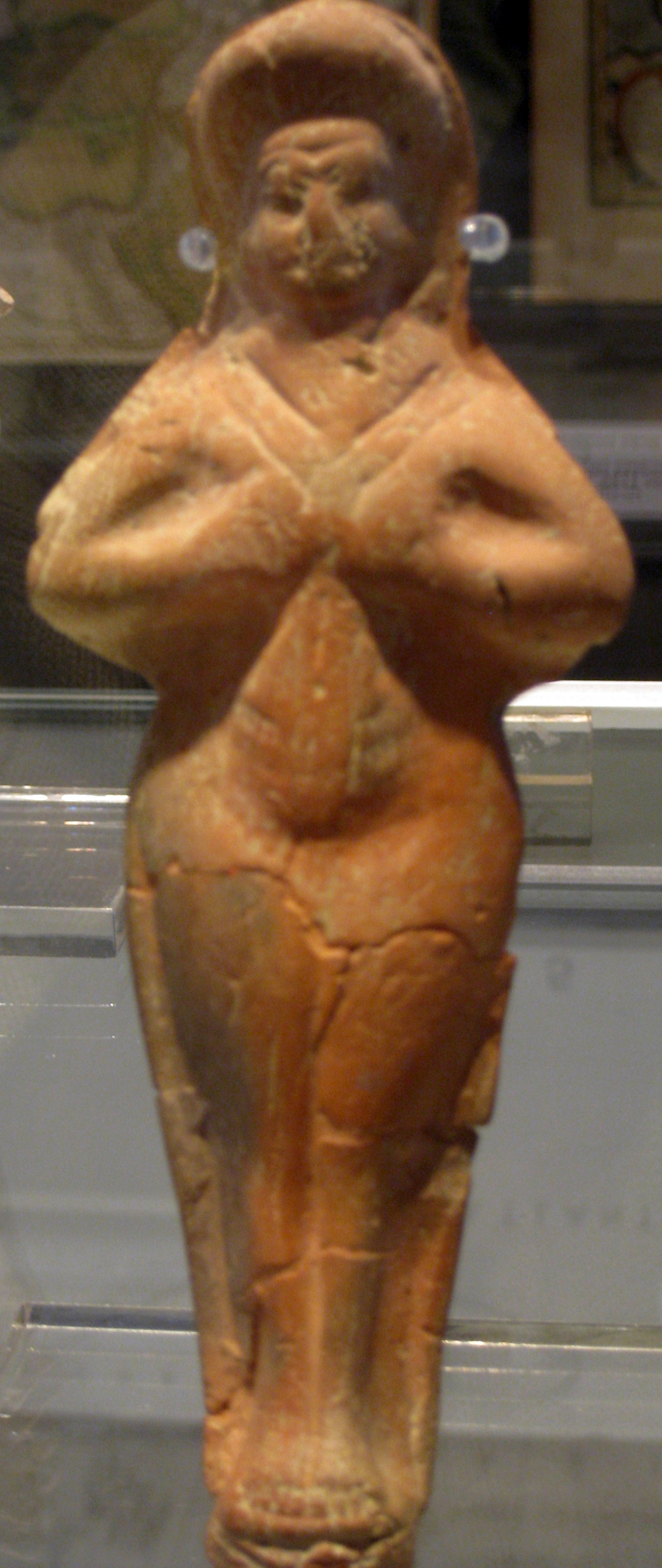 National Maritime Museum, Israel - Terracotta Figurines Women. Pottery. Second half of the second millenium BC. Middle Elamite Period, Iran. המוזיאון הימי הלאומי בחיפה צלמיות עתיקות אישה. צלמית חרס. התקופה העילמית התיכונה. המחצית השניה של האלף השני לפנה"ס. איראן